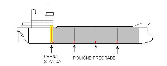 design of an old tanker